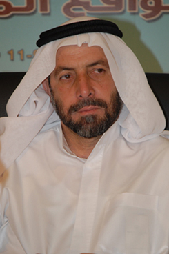 iraqi man